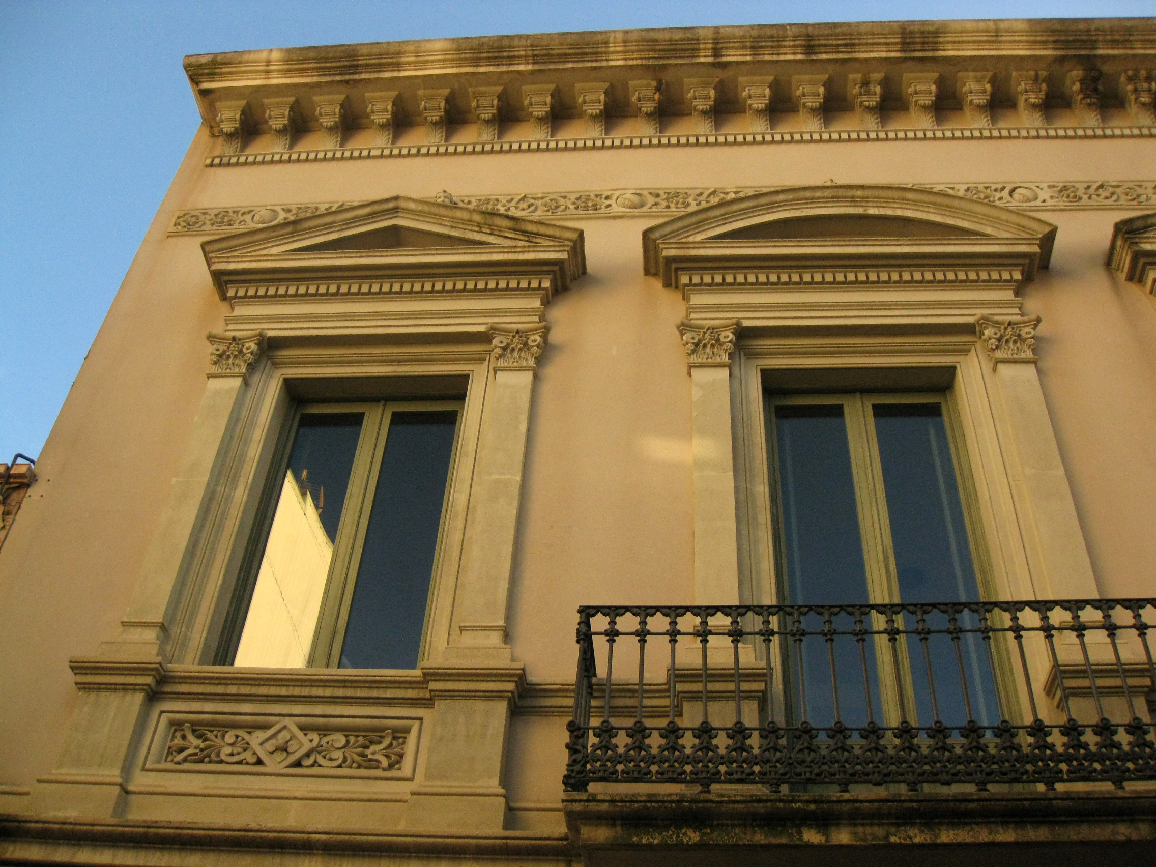 Casa Narcís Argemí, al carrer de Joaquim de Paz núm. 54-56 (Terrassa). Edifici eclèctic de Rafael Puig i Puig (1892). Detall de la façana.